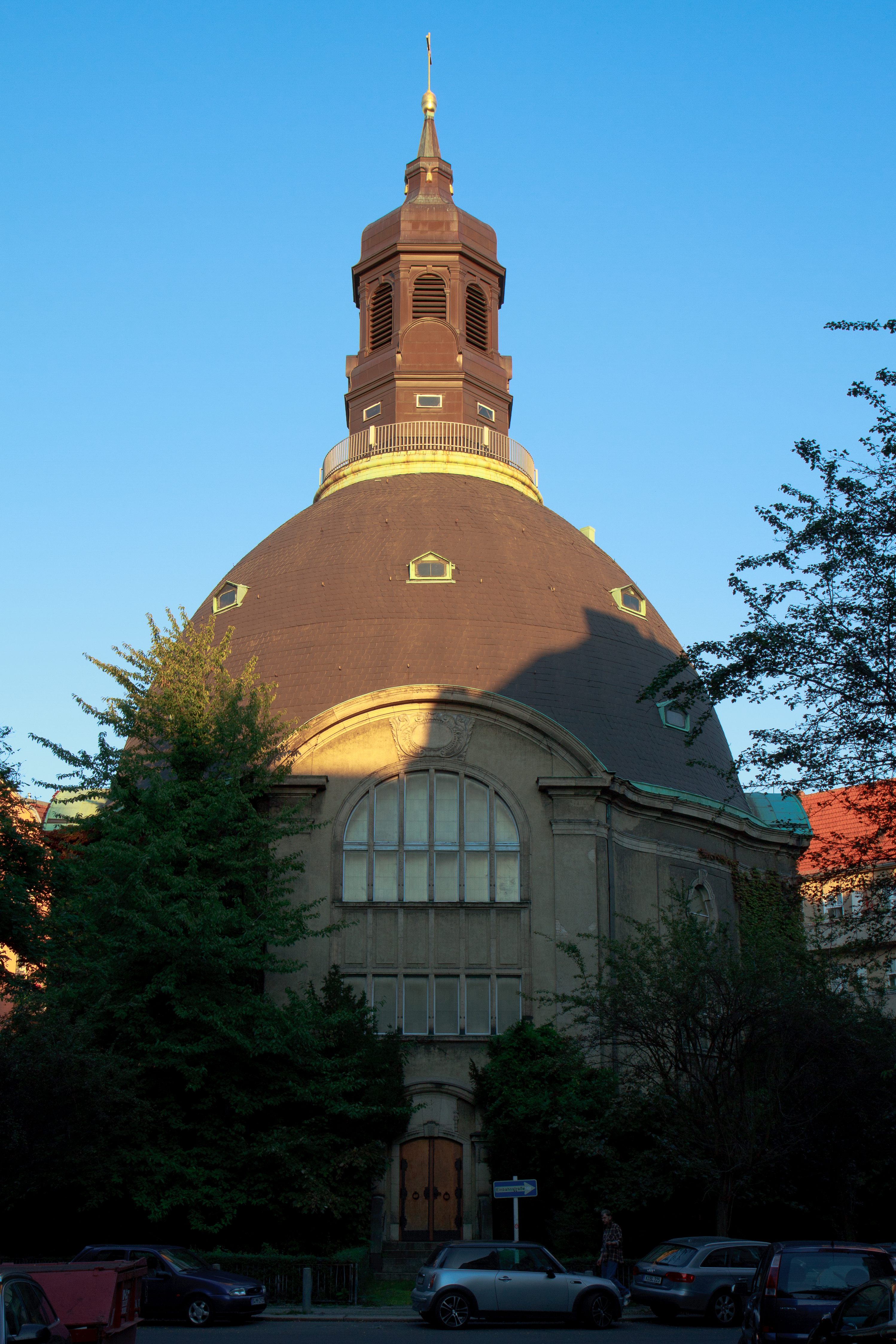 Königin-Luise-Gedächtniskirche, Berlin - Schöneberg, 2011